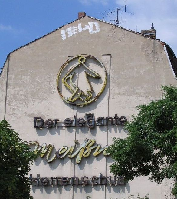 Unter Denkmalschutz stehende Leuchtwerbung für Schuhe der Meißner Schuhfabrik an der Fassade eines Hauses in der Dresdner Hechtstraße (Zustand 2008)